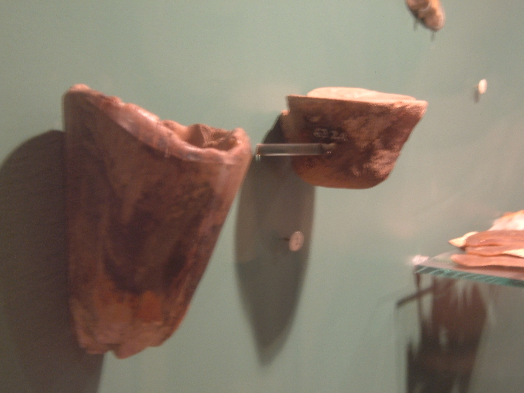 Mamutagyar és jávorszarvasagancs-pohár a Damjanich János Múzeum gyűjteményében (Szolnok)